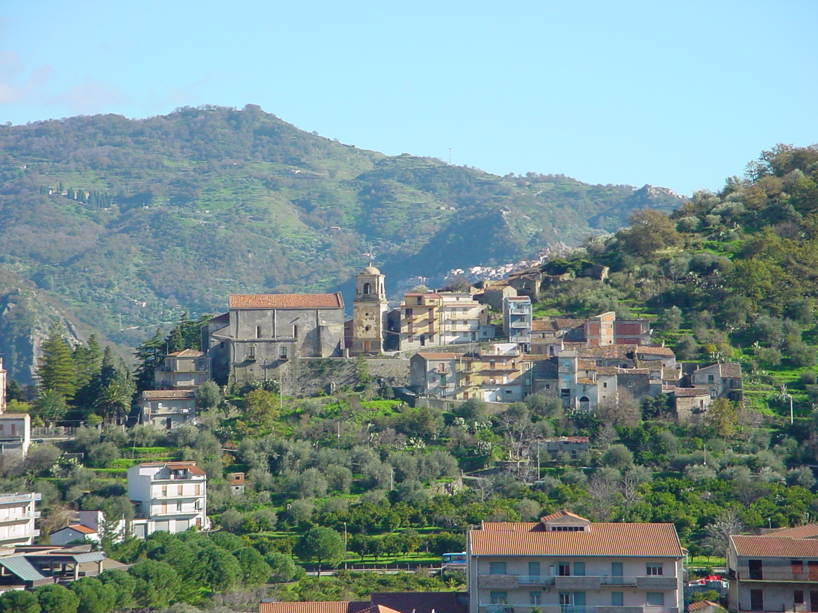 La foto rappresenta la Chiesa Matrice e il Quartiere Contarato a Francavilla di Sicilia